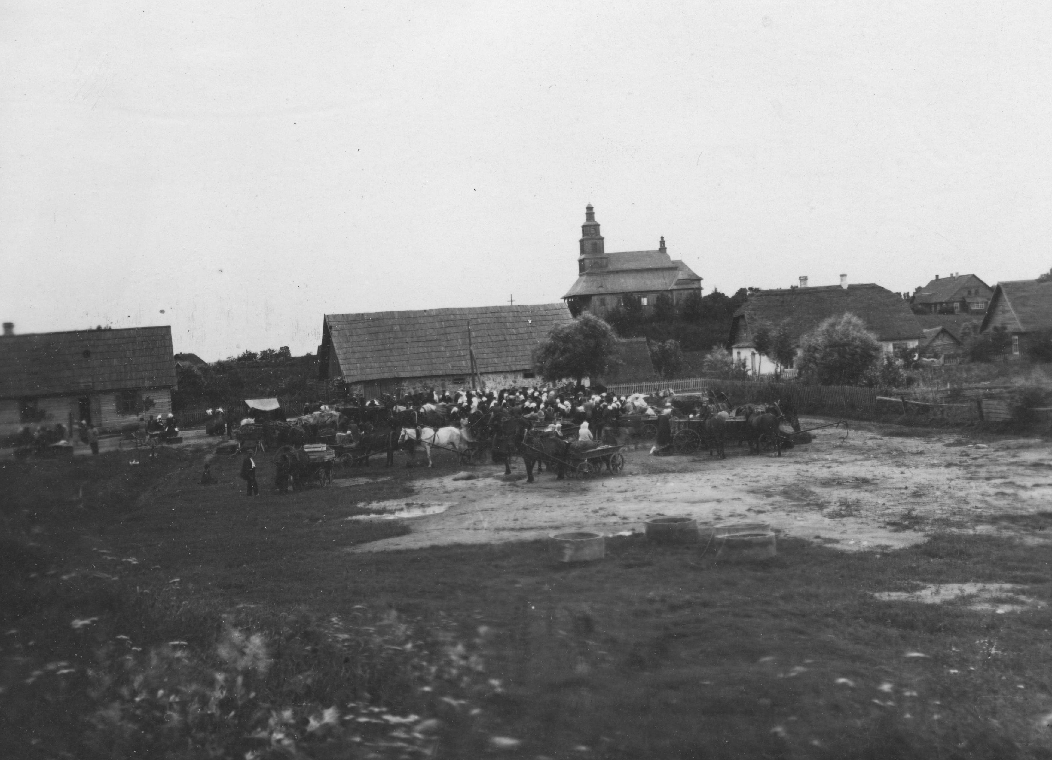 Беларуская (тарашкевіца): Дрысьвяты (Dryśviaty), пляц Рынак (plac Rynak). Касьцёл Сьвятых Апосталаў Пятра і Паўла